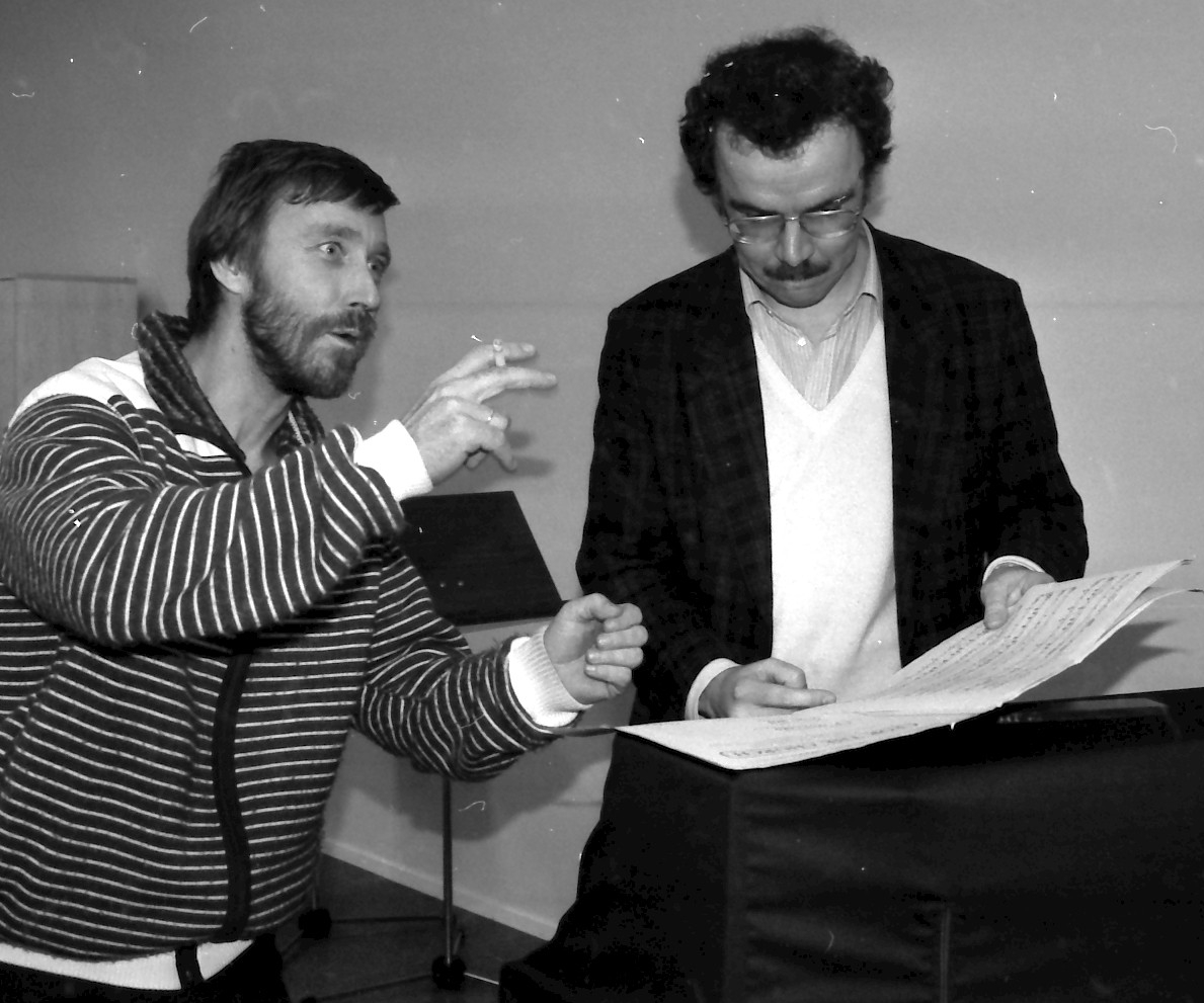 Okko Kamu ja pianotaiteilija Eero Heinonen ennen konserttia Kuusankoskitalon Kuusaasalissa 12.1.1987